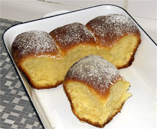 Buchteln - eine Mehlspeise aus Germteig